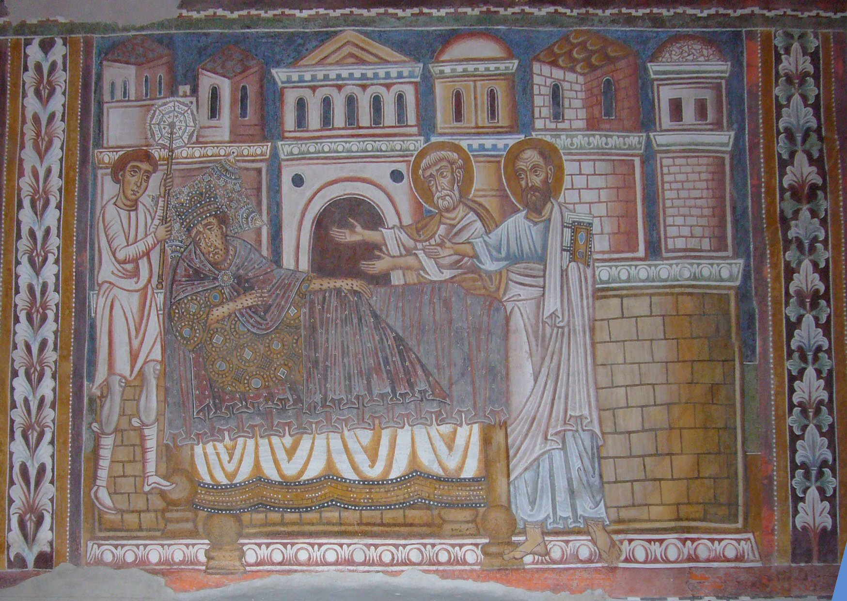 Roma, Santi Quattro Coronati, oratorio di S. Silvestro: Costantino, colpito da lebbra, sogna i santi Pietro e Paolo